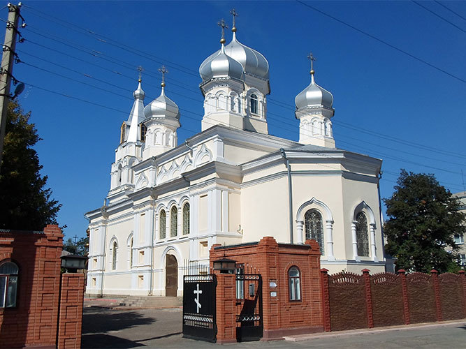 Свято-Николаевский кафедральный собор в Старобельске